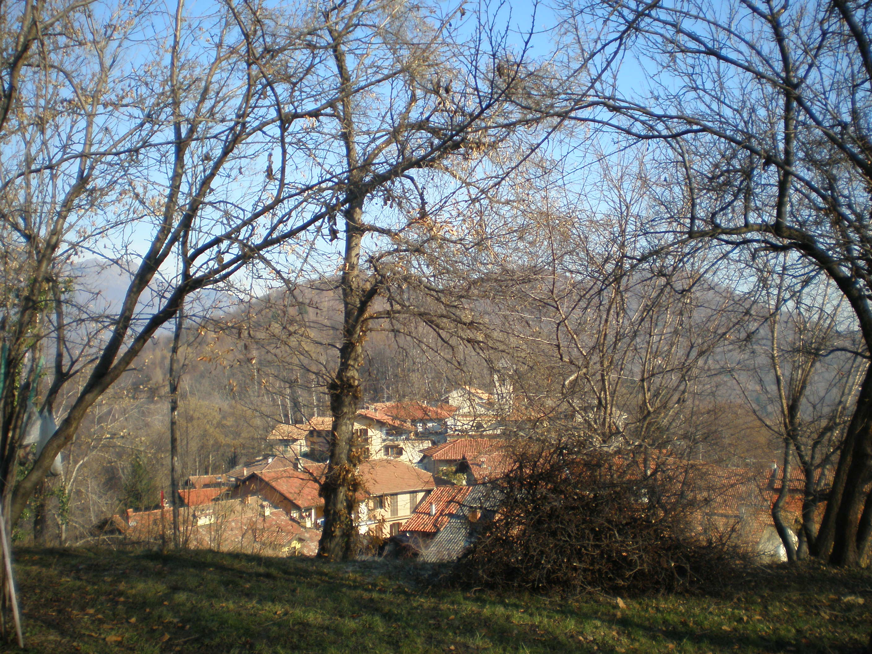 Colma di Andorno (Biella, Italy)